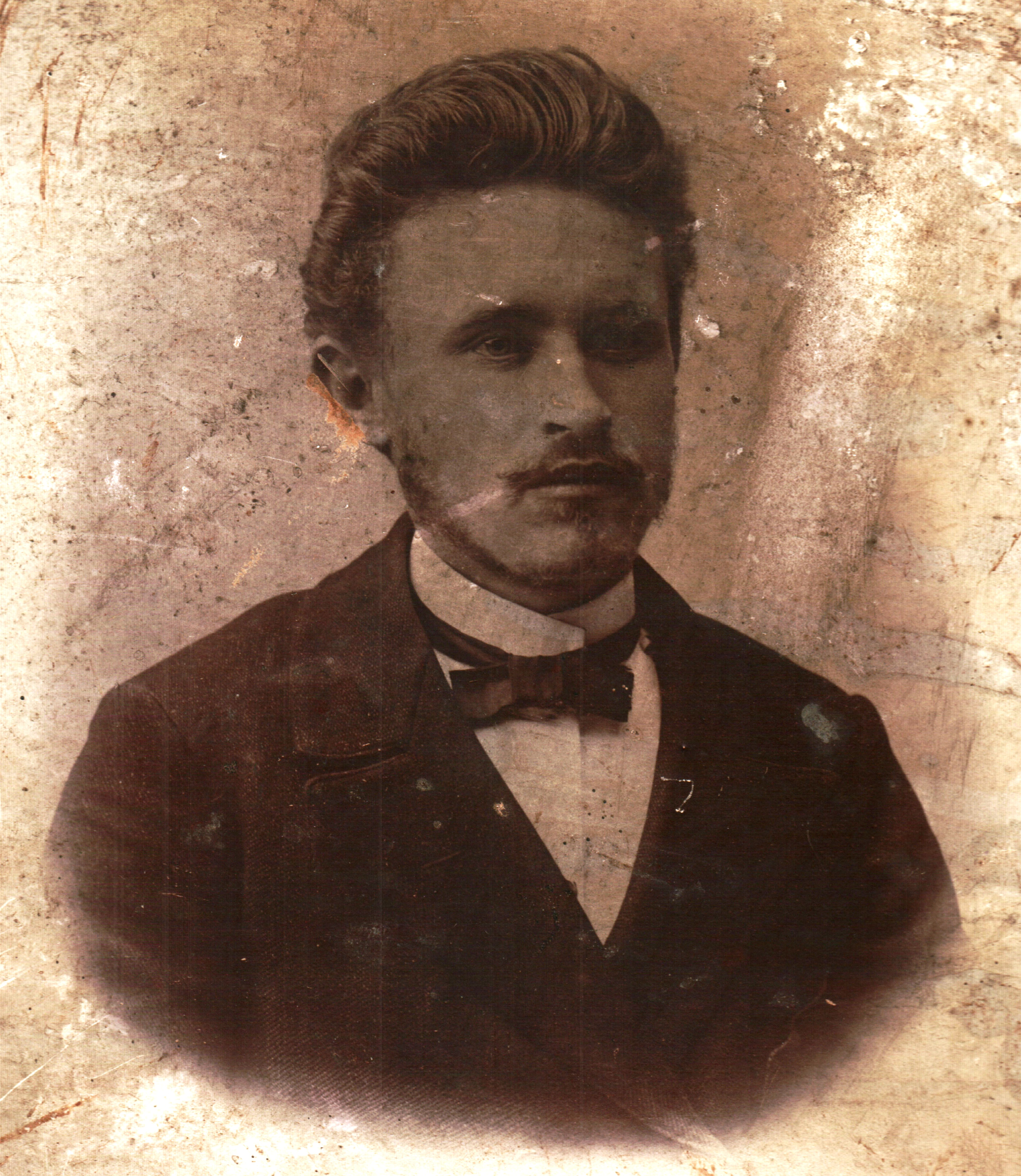 Снимка на Х. Чемков